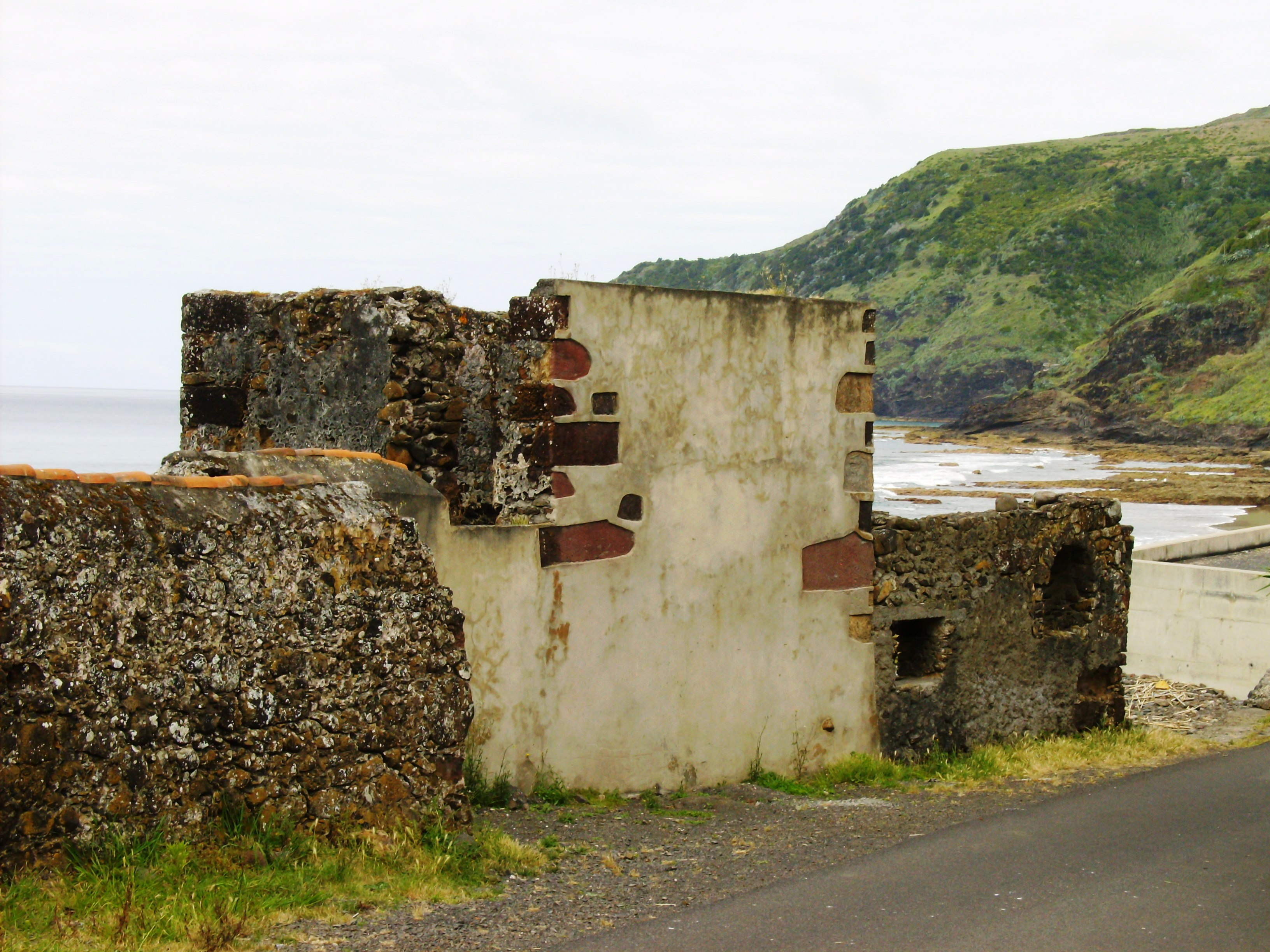 Forte de São João Baptista da Praia Formosa, Ilha de Santa Maria (Açores), Portugal.